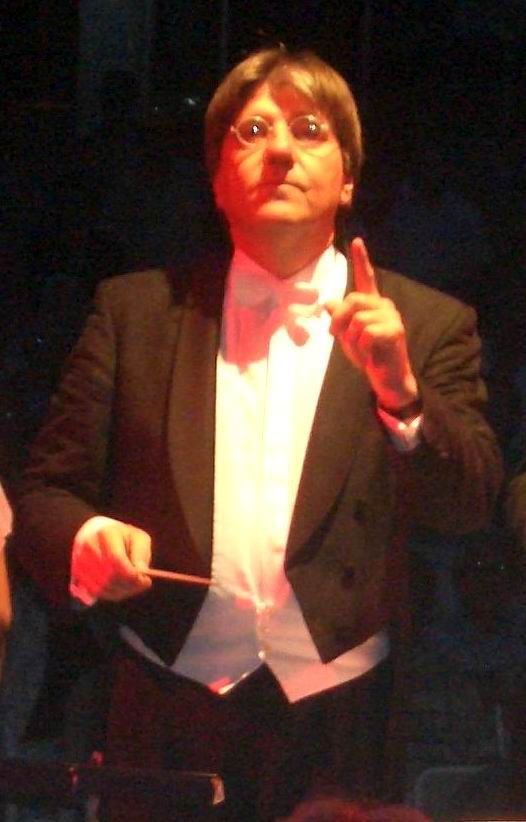 Konzert